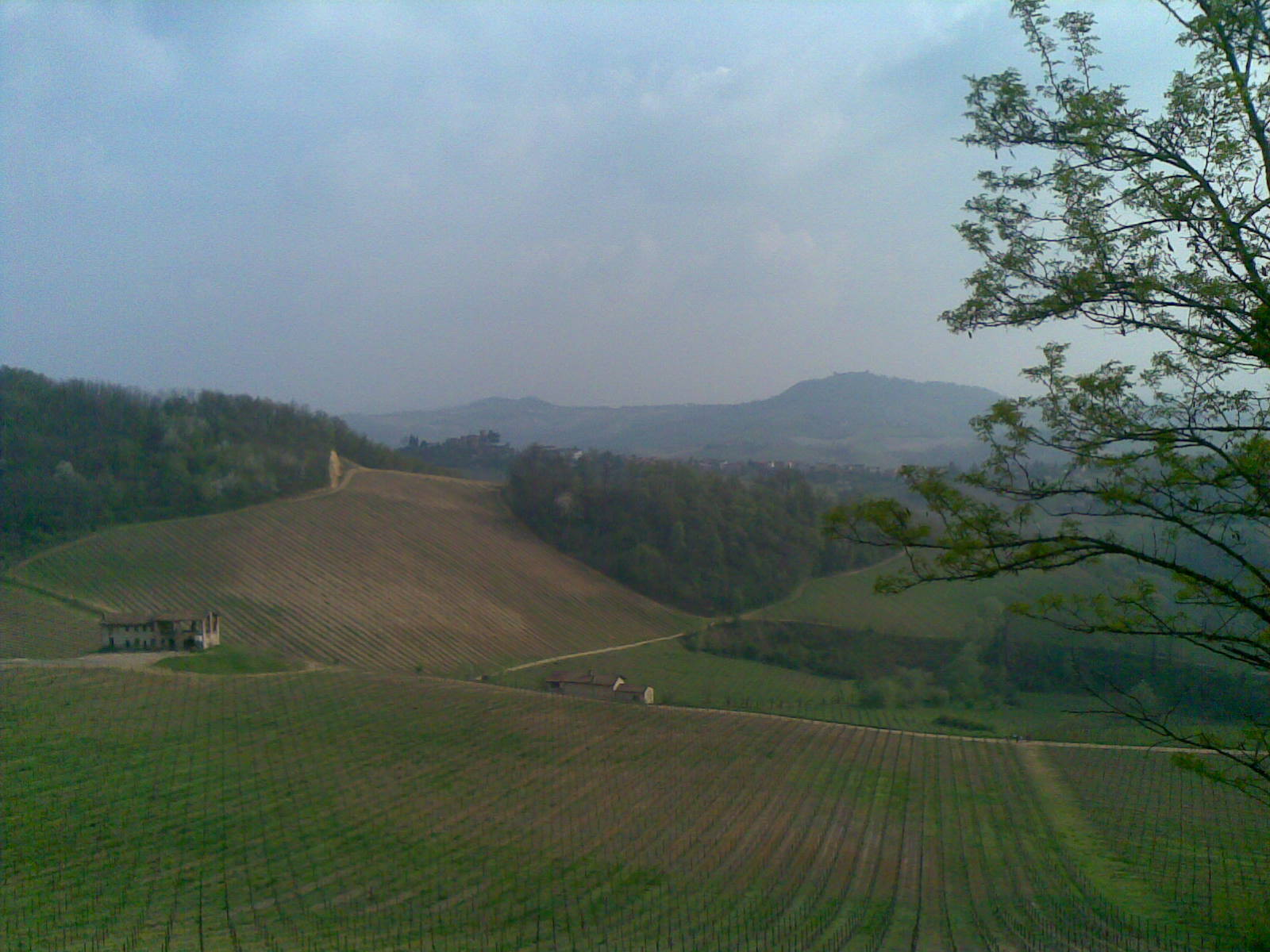 panorame sulle colline